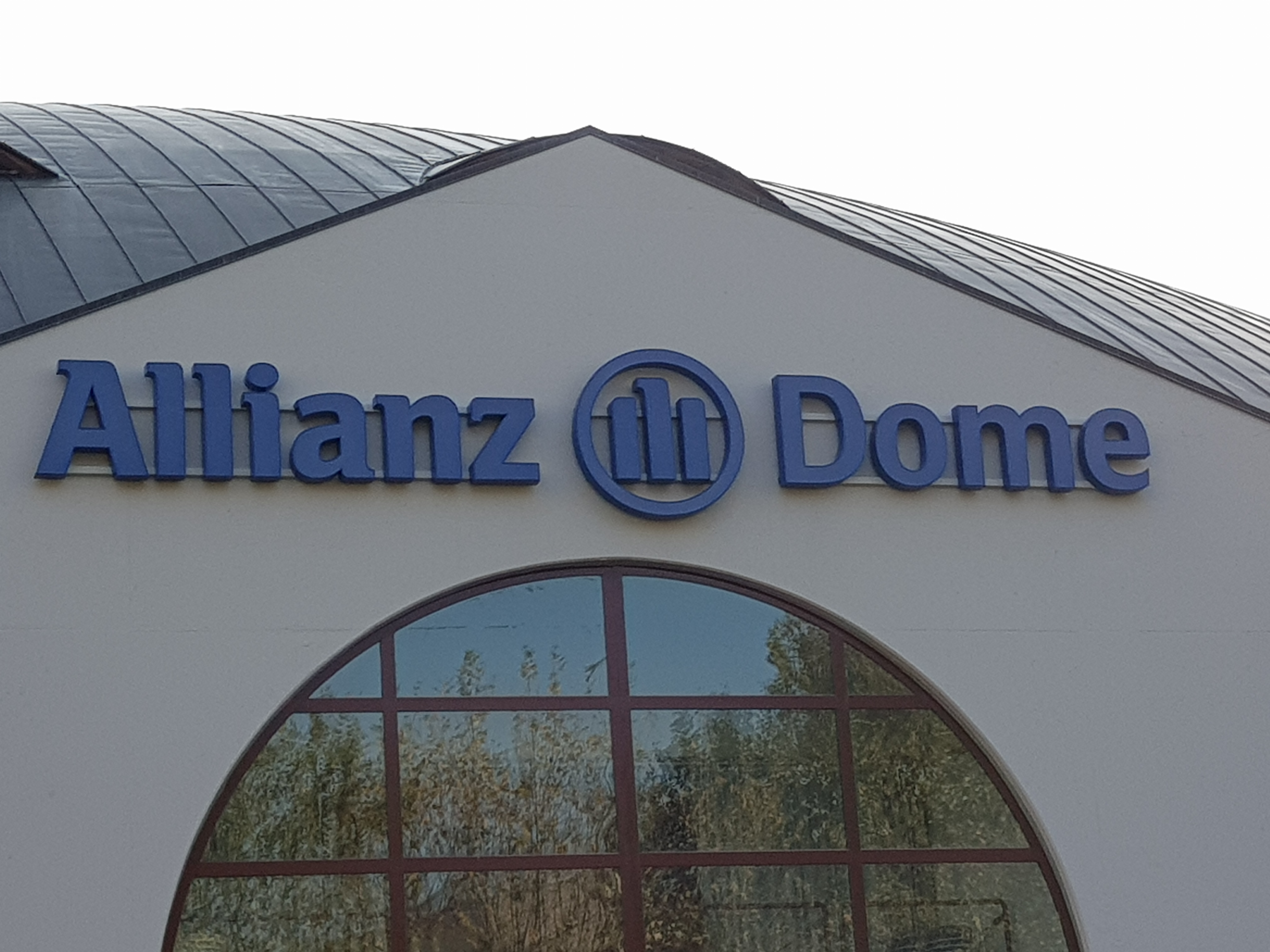 Logo del palazzetto dello sports "Allianz Dome"